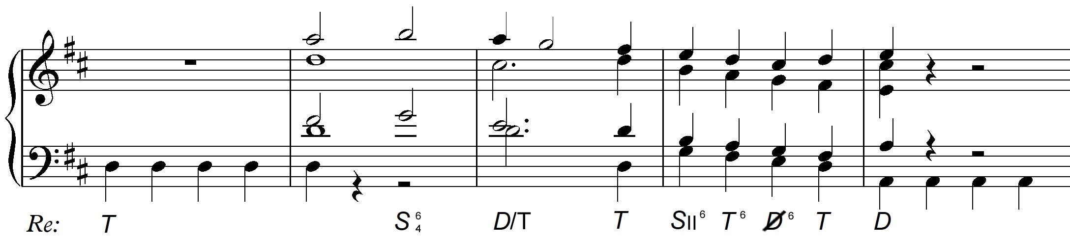 Analisis con Cifrado Funcional